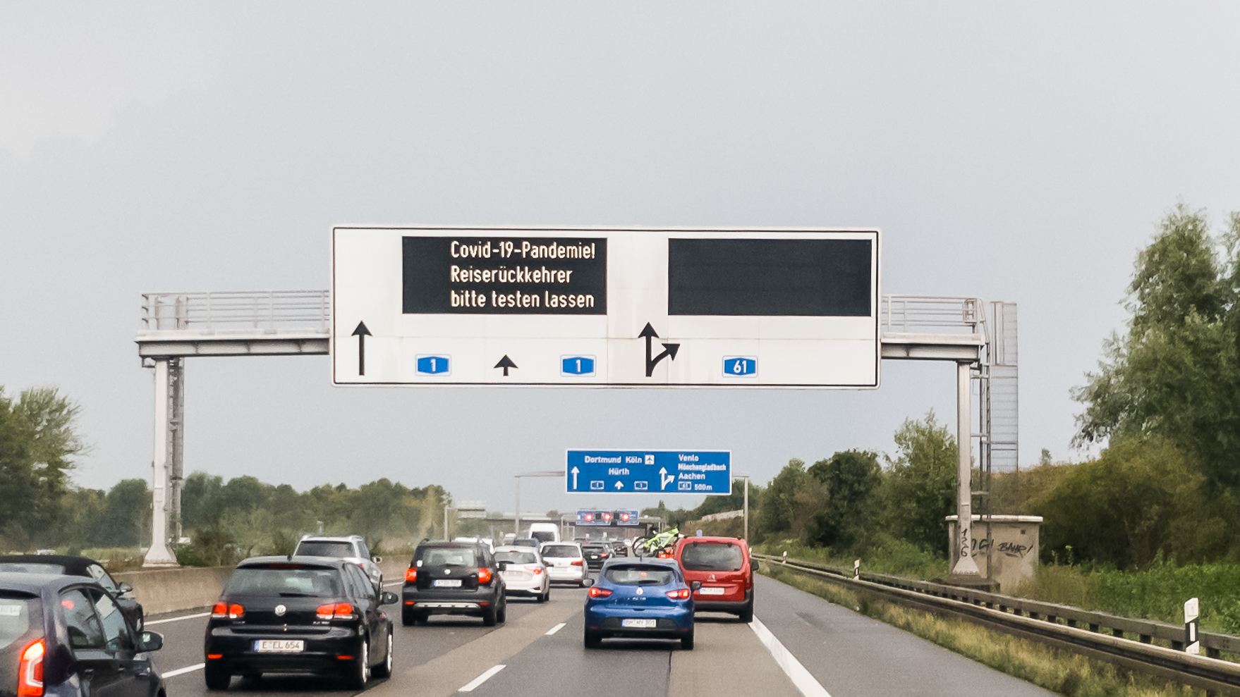 Autobahn A1 vor dem Autobahndreieck Erfttal, nordwärts. Schilderbrücke „Covid-19-Pandemie! Reiserückkehrer bitte testen lassen“